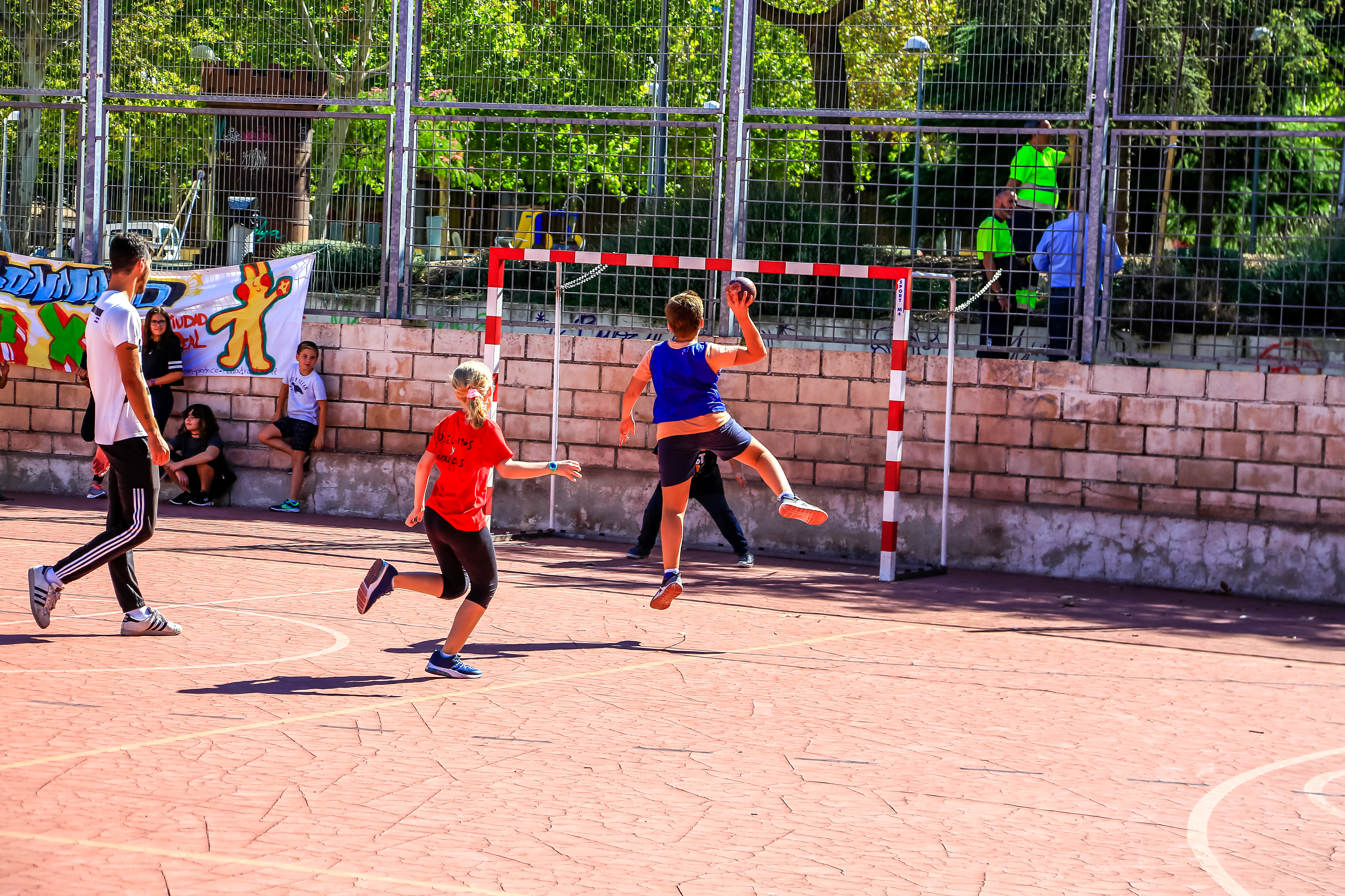 SED 2019 - Ciudad Real (155)